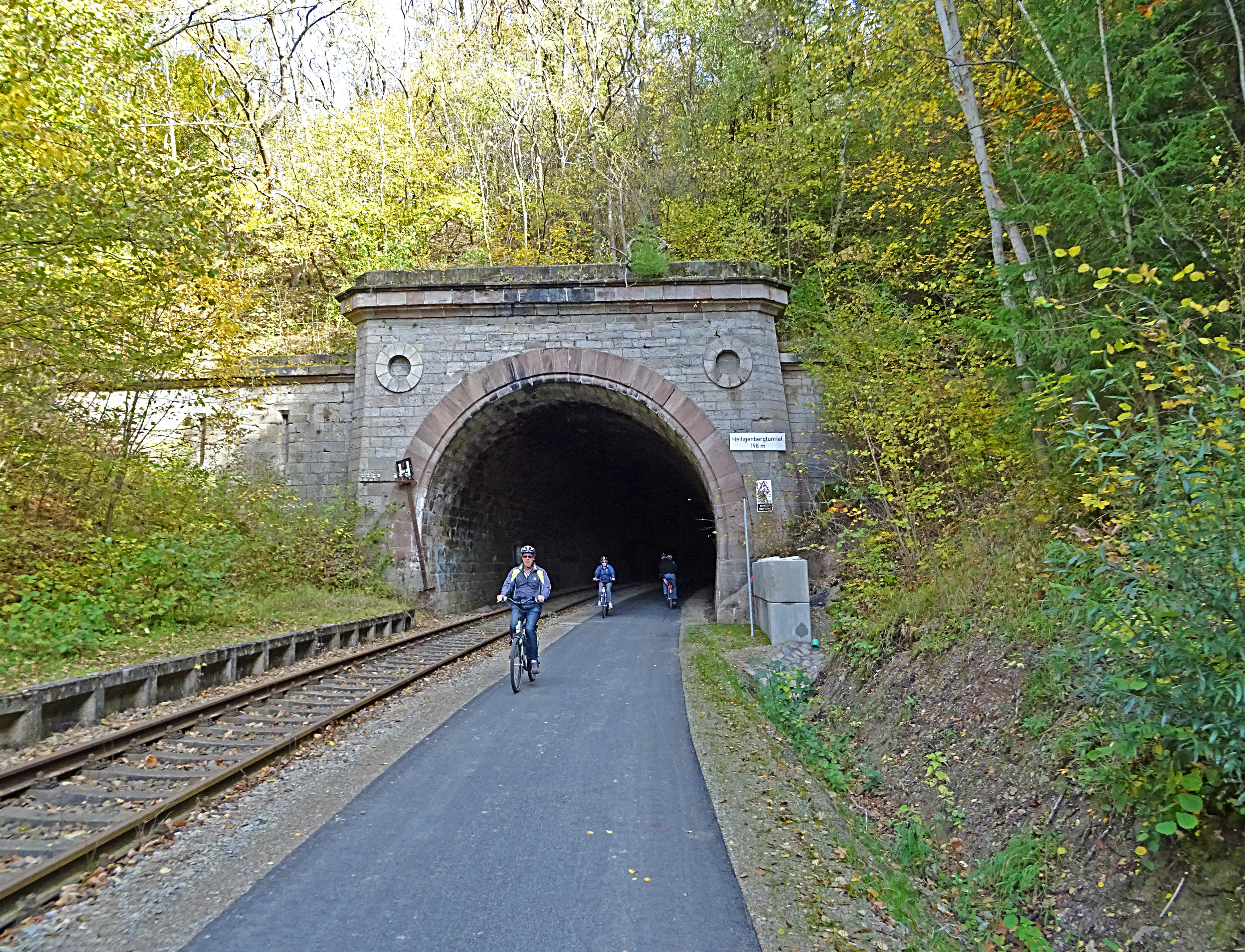 Heiligenbergtunnel 198 m